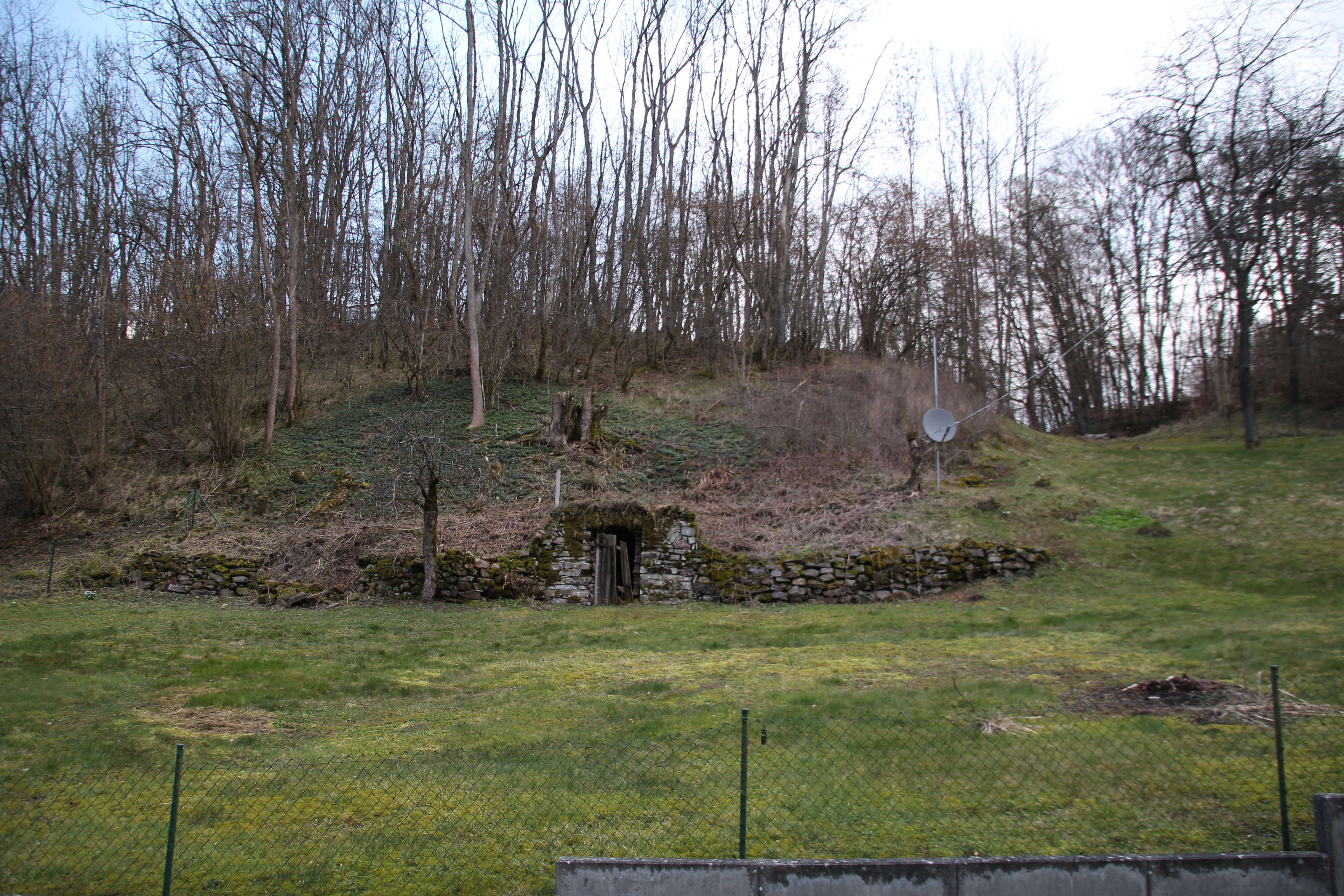 Wallenfels